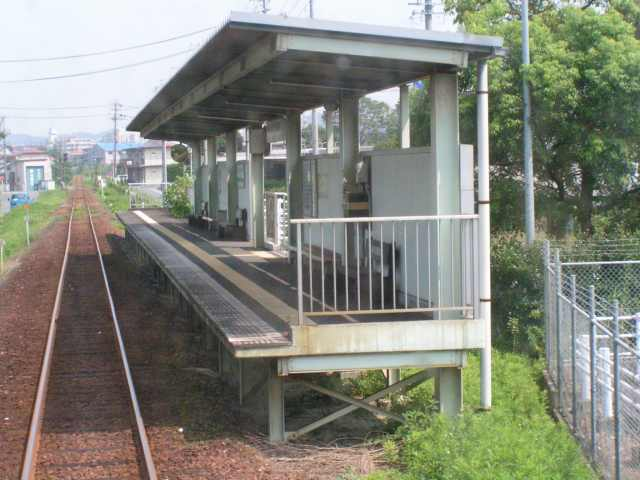 掛川市役所前駅。2006年8月1日、Ribbonが撮影。